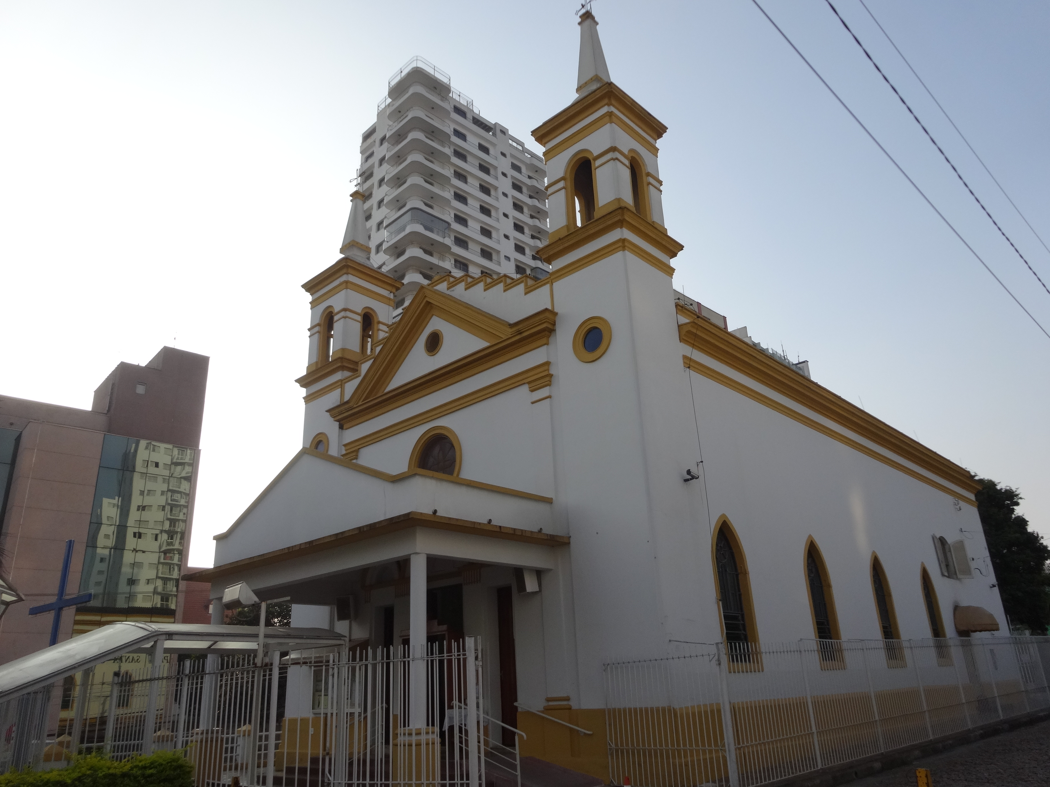 Arquitetura da Capela Santa Cruz